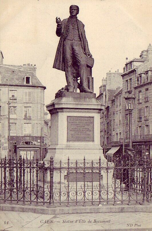 Caen, département du Calvados, sur une carte postale de la fin du 19e ou du début du 20e siècle. La statue en bronze d'Élie de Beaumont réalisée par Louis Rochet. Elle est inaugurée le 6 août 1876 sur la place Saint-Sauveur. En février 1942, sous le régime de Vichy, elle est déboulonnée et fondue dans le cadre de la mobilisation des métaux non ferreux. Après la Libération, une statue en pierre de François de Malherbe est installée sur le piédestal. Le 12 novembre 1961, cette dernière est retirée afin d'installer la statue de Louis XIV réalisée par Louis Petitot en 1828